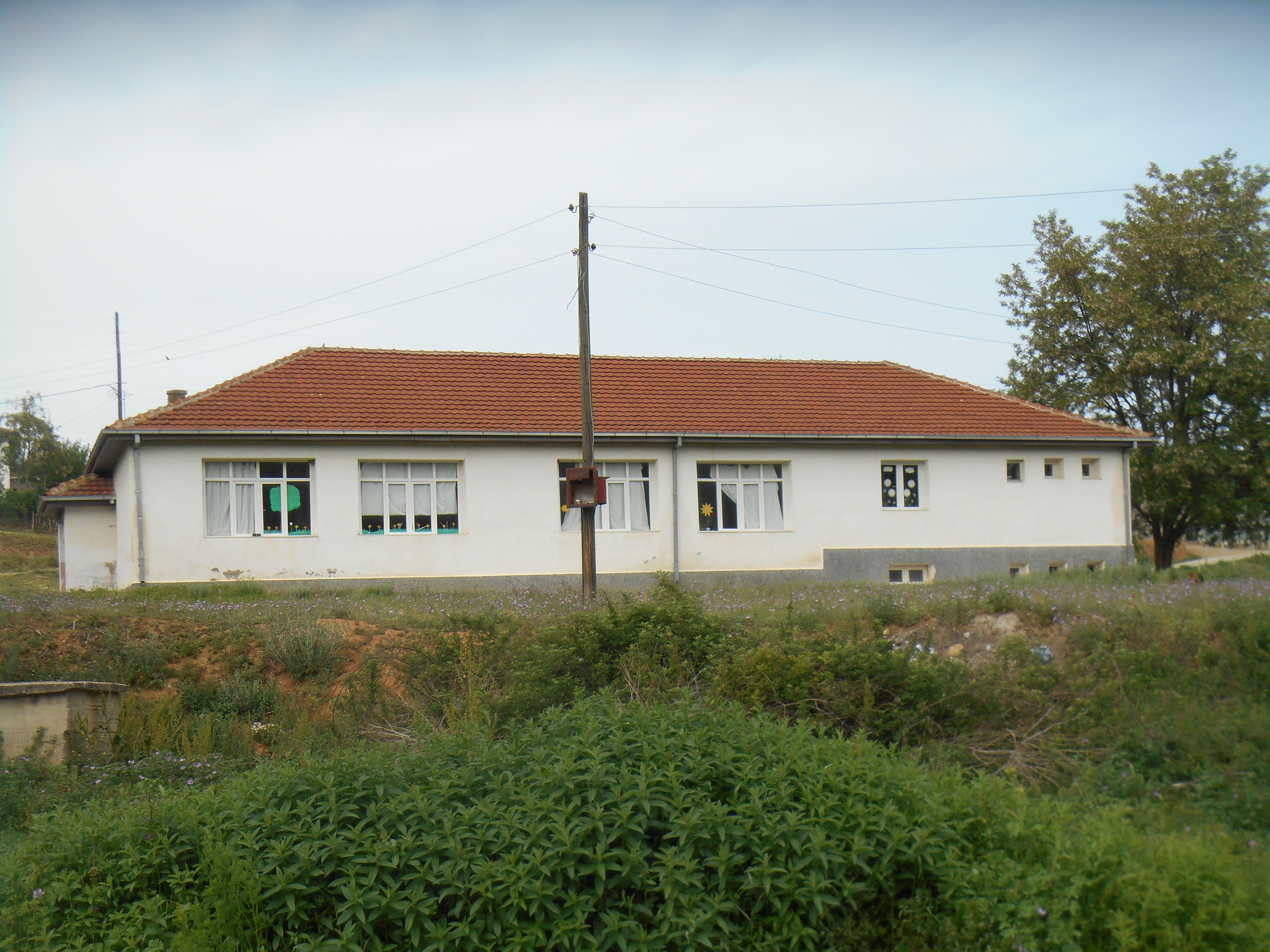 Основно училиште „Гоце Делчев“ - Владиевци